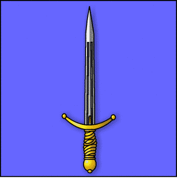 comte militaire